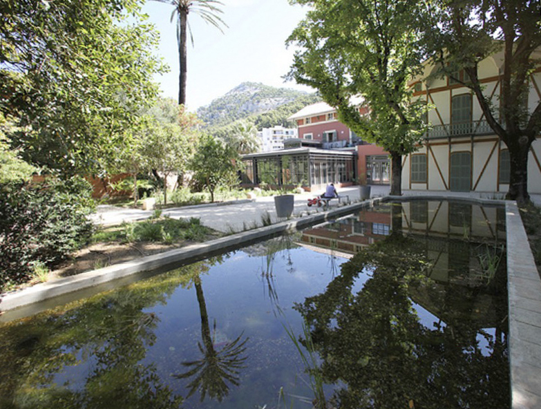 Muséum d'Histoire naturelle de Toulon et du Var (France)